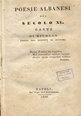 Cover of Milosao Songs (in Italian) 1836, Guttenberg Poesie albanesi del secolo XV. Canti di Milosao figlio del despota di Scutari Tipografia del Guttenberg, Napoli 1836, pp.96 Author: Girolamo de Rada (1814 – 1903)